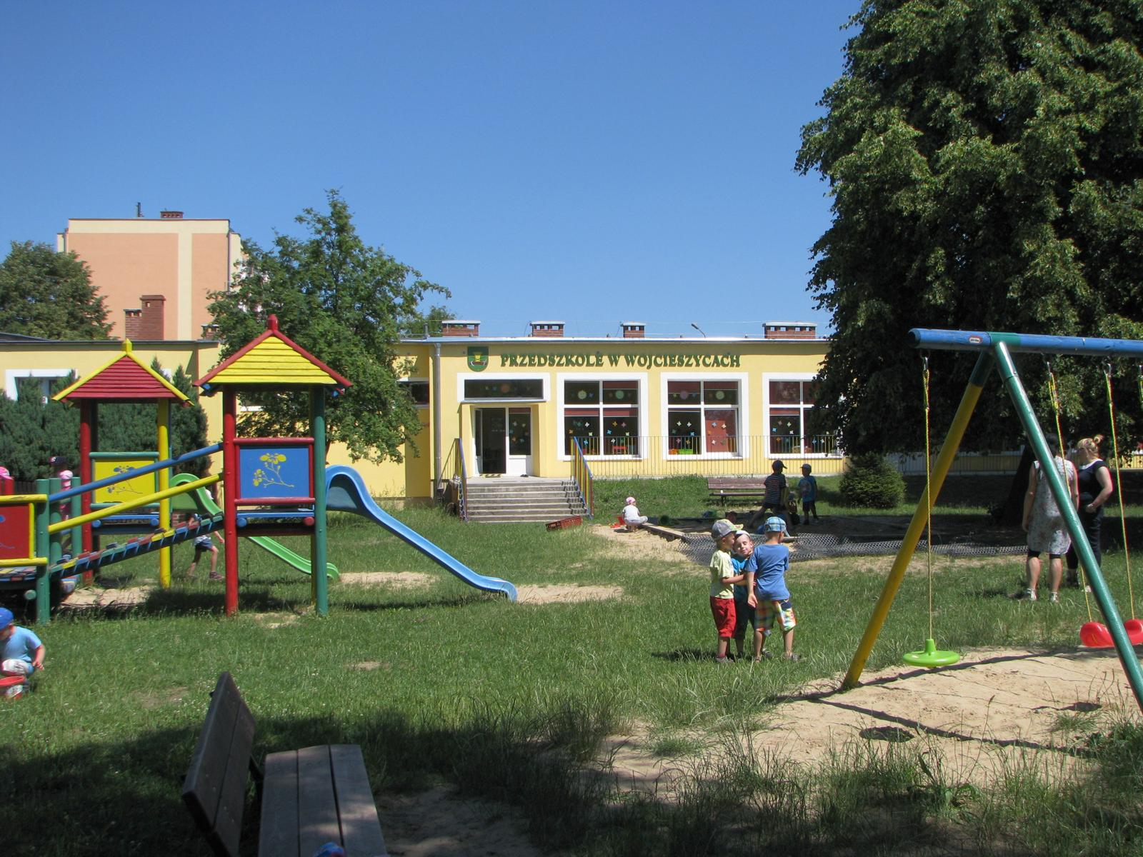 Wojcieszyce. Przedszkole